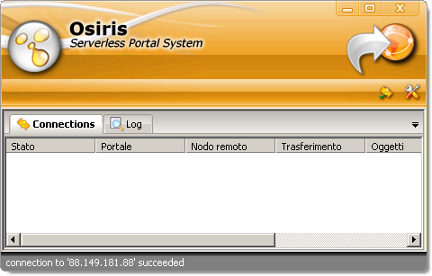 Schermata principale di osiris versione 0.11